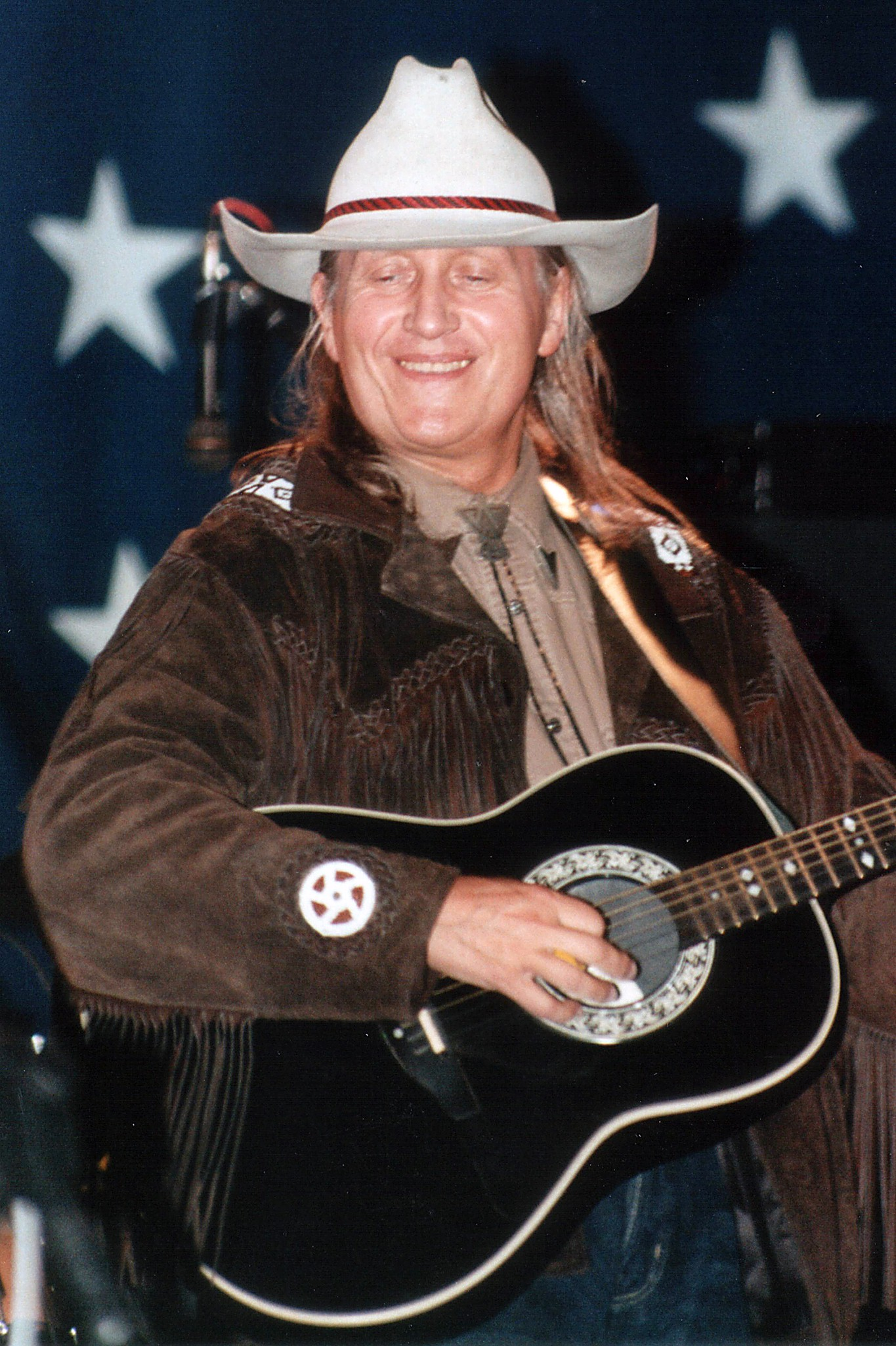 Lonstar na koncercie 15-lecia „Country w Bieszczadach”.